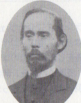 日本最初の長老派の牧師の一人小川義綏